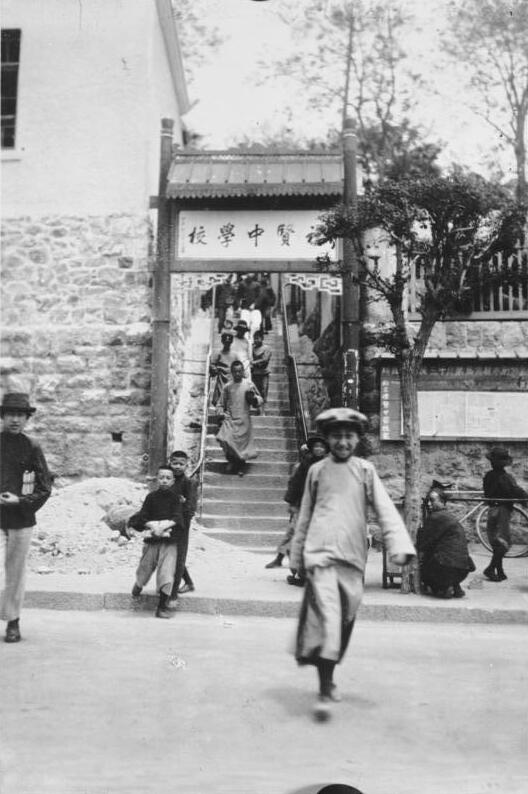 Tsingtau, Missions-Mittelschule der Ostasienmission China, Tsingtau Missions-Mittelschule der Ostasienmission in Tsingtau. [Gründer dieser Schule war im Jahr 1900 der in Frankfurt 1929 verstorbene berühmte Sinologe und beste deutsche Chinakenner Prof. Dr. Wilhelm, ein geborener Schwabe. Er begann seine Tätigkeit in Ostasien als Geistlicher und Missionar. Ihm schwebte der ost] Information added by Wikimedia users.Das Bild zeigt die Schule der Deutsche Ostasienmission.